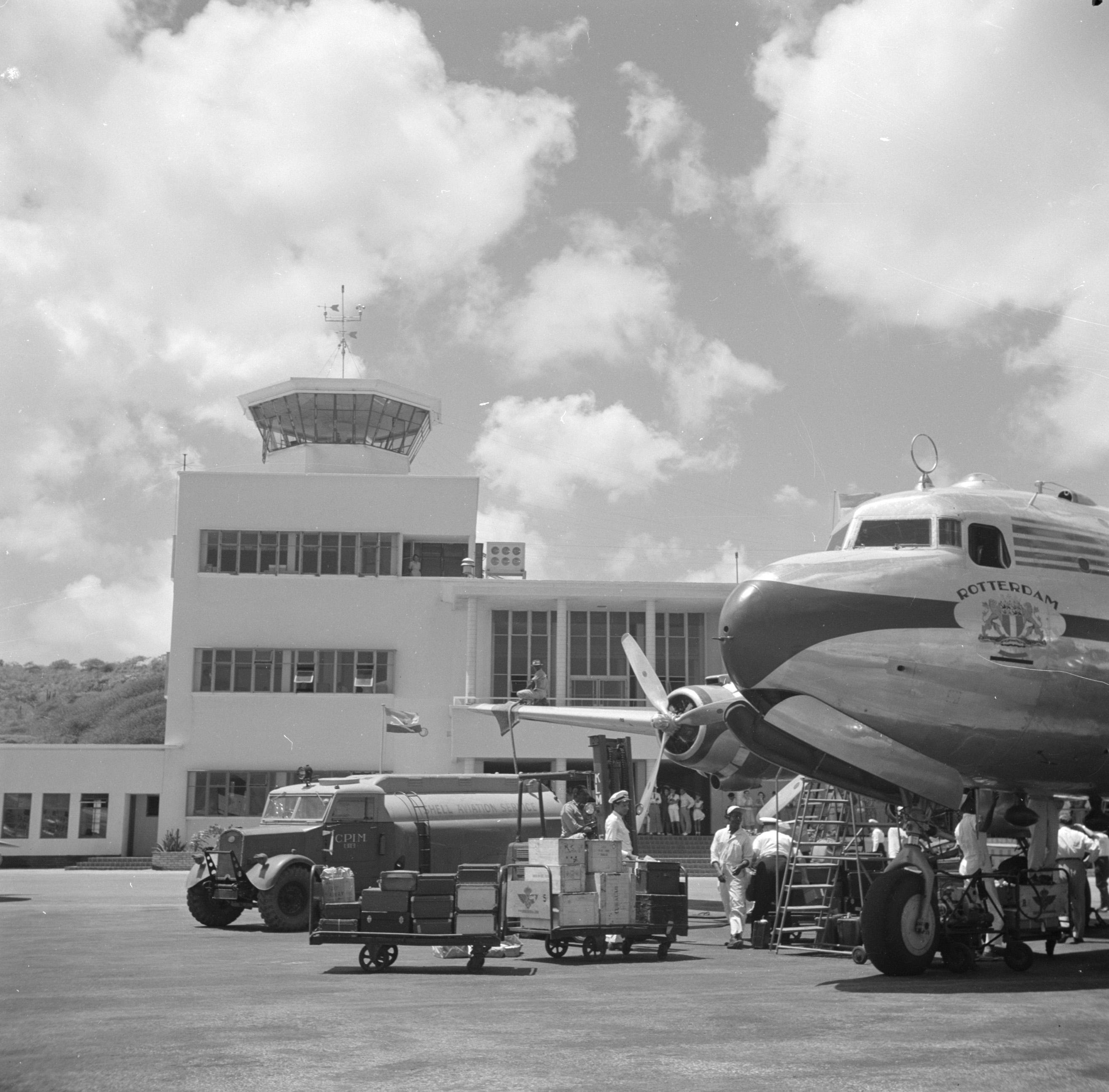 Collectie / Archief : Fotocollectie Van de Poll Reportage / Serie : Reis naar Suriname en de Nederlandse Antillen Beschrijving : Het gebouw van vliegveld Hato op Curaçao Datum : 1947 Locatie : Curaçao Trefwoorden : bagage, gebouwen, vliegtuigen, vliegvelden Fotograaf : Poll, Willem van de, [onbekend] Auteursrechthebbende : Nationaal Archief Materiaalsoort : Negatief (zwart/wit) Nummer archiefinventaris : bekijk toegang 2.24.14.02 Bestanddeelnummer : 252-7673